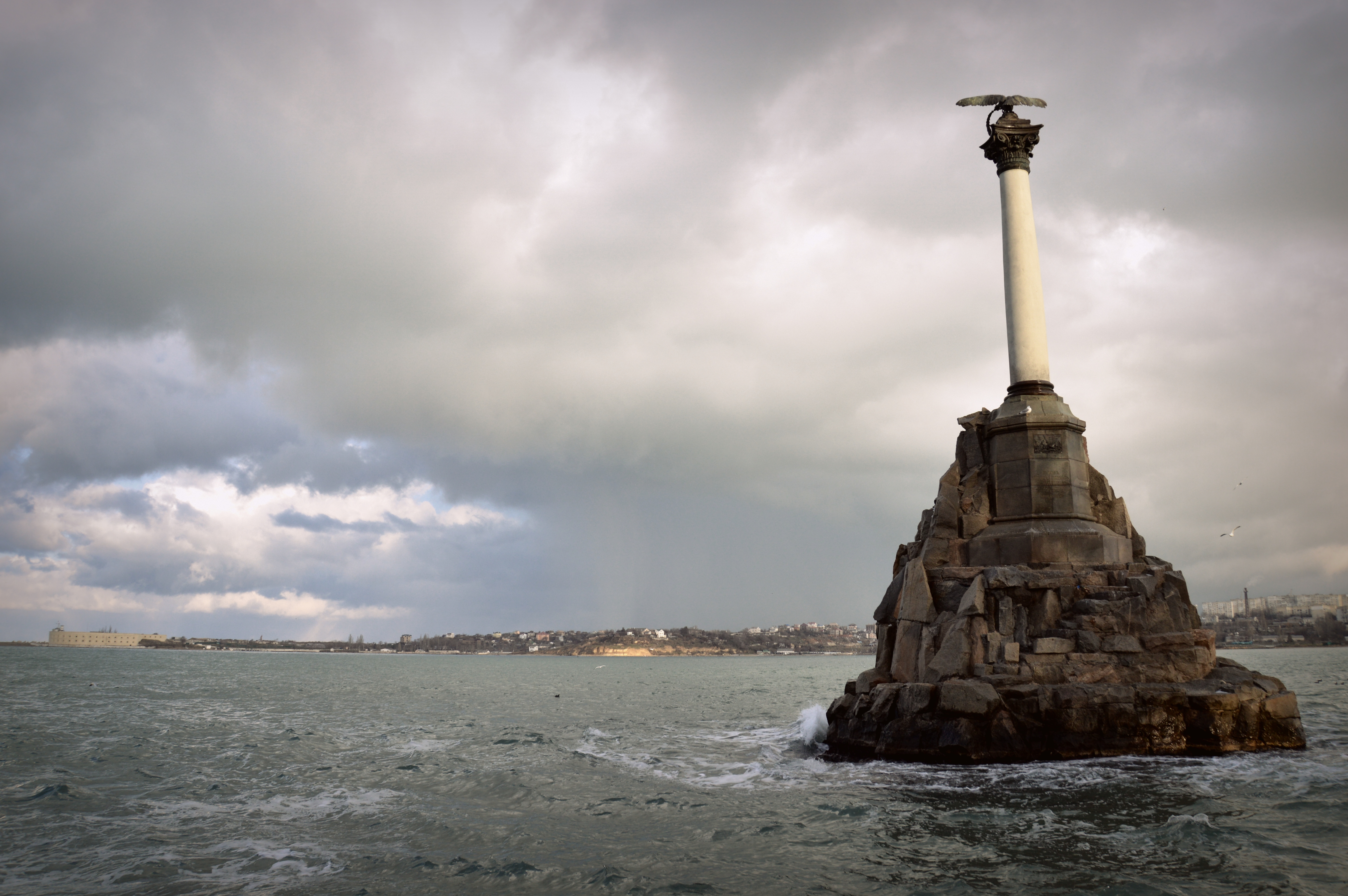 Памятник затопленным кораблям: Севастопольськая бухта, Ленинский район, Севастополь This object is located on the Crimean Peninsula and recognized as cultural heritage by both Russia and Ukraine under the monument ID: 9230208000/ 85-002-0003, respectively. The legal status of the Crimean region is currently disputed.